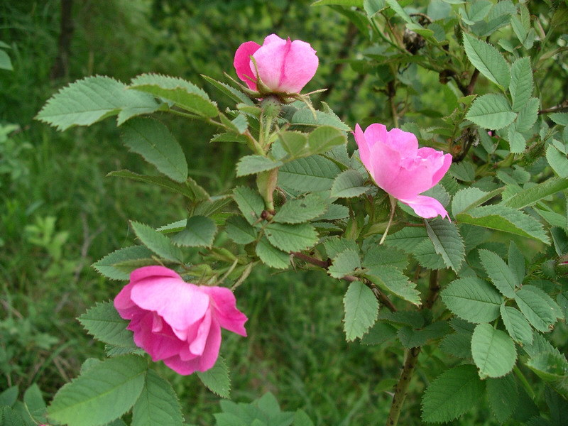 Erškėtis